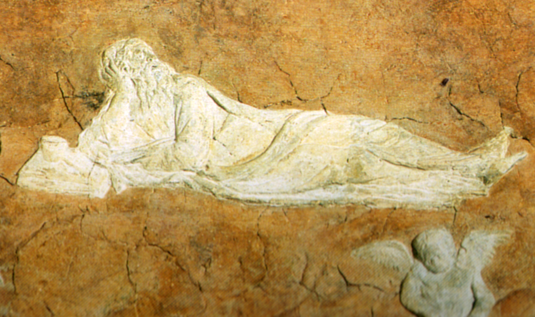 Donatello, storie di san giovanni evangelista, s.g. a patmos, 1434-43 dettaglio